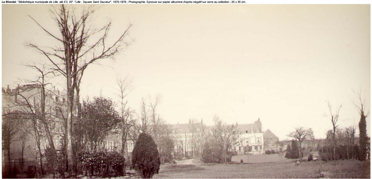 Lille — Square Saint-Sauveur. 1870-1878 Photographie. Épreuve sur papier albuminé d'après négatif sur verre au collodion ; 26 x 35 cm.